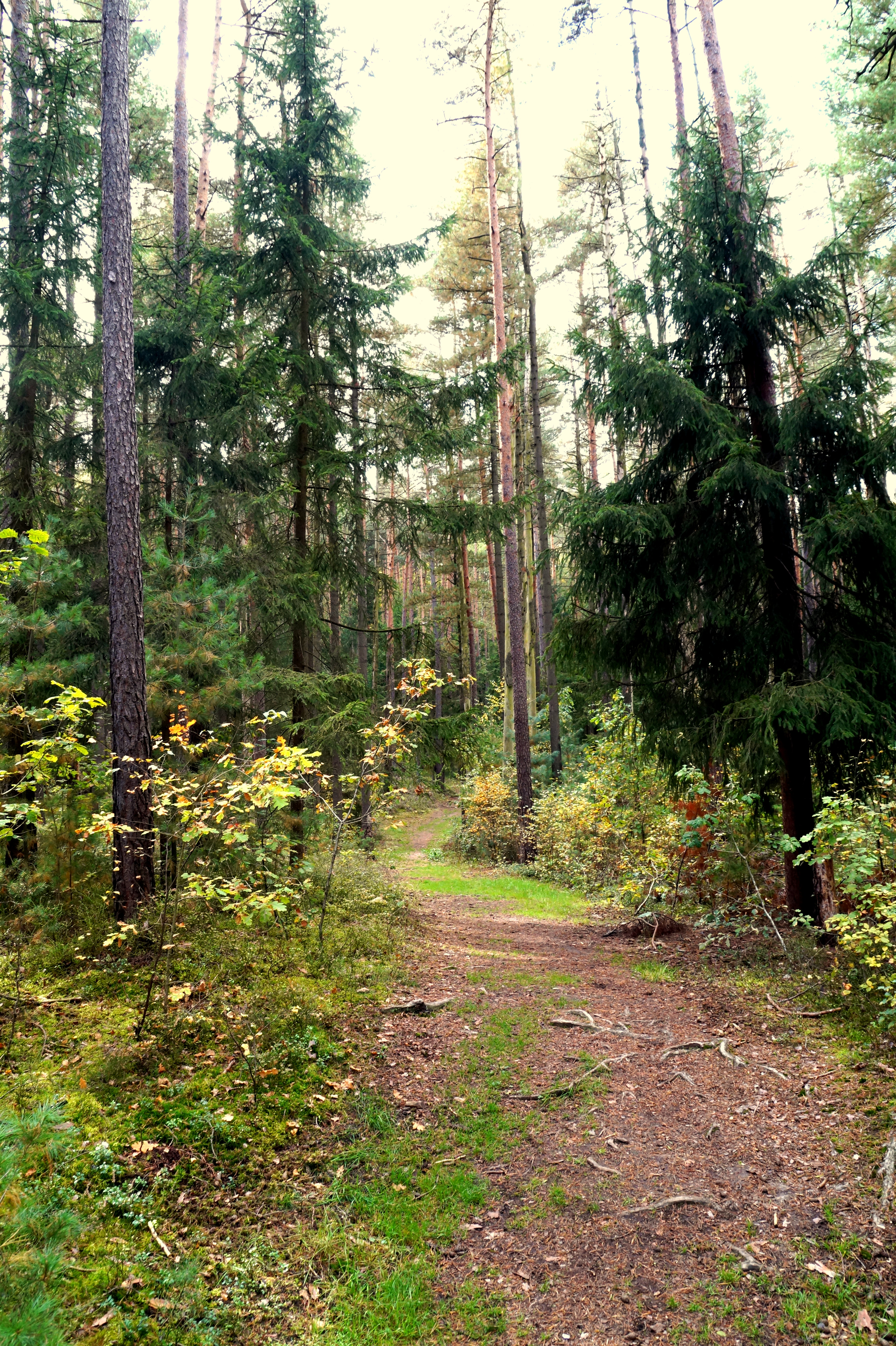 Das Bild wurde in Fürther Stadtwald aufgenommen.